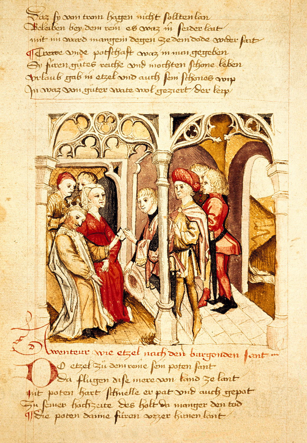 Nibelungenlied. Hundeshagenscher Kodex